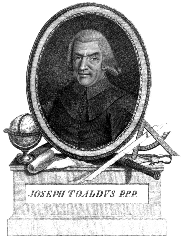 Ritratto di Giuseppe Toaldo tratta del libro "Completa raccolta... " di Toaldo (volume 1 - 1802)